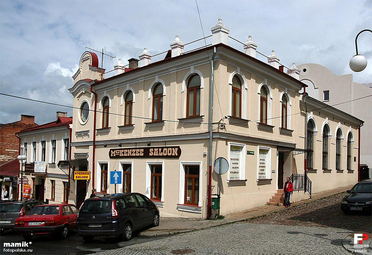 Mała Synagoga, w której mieści się teraz restauracja kowbojska. Po prawej ulica Krzywa